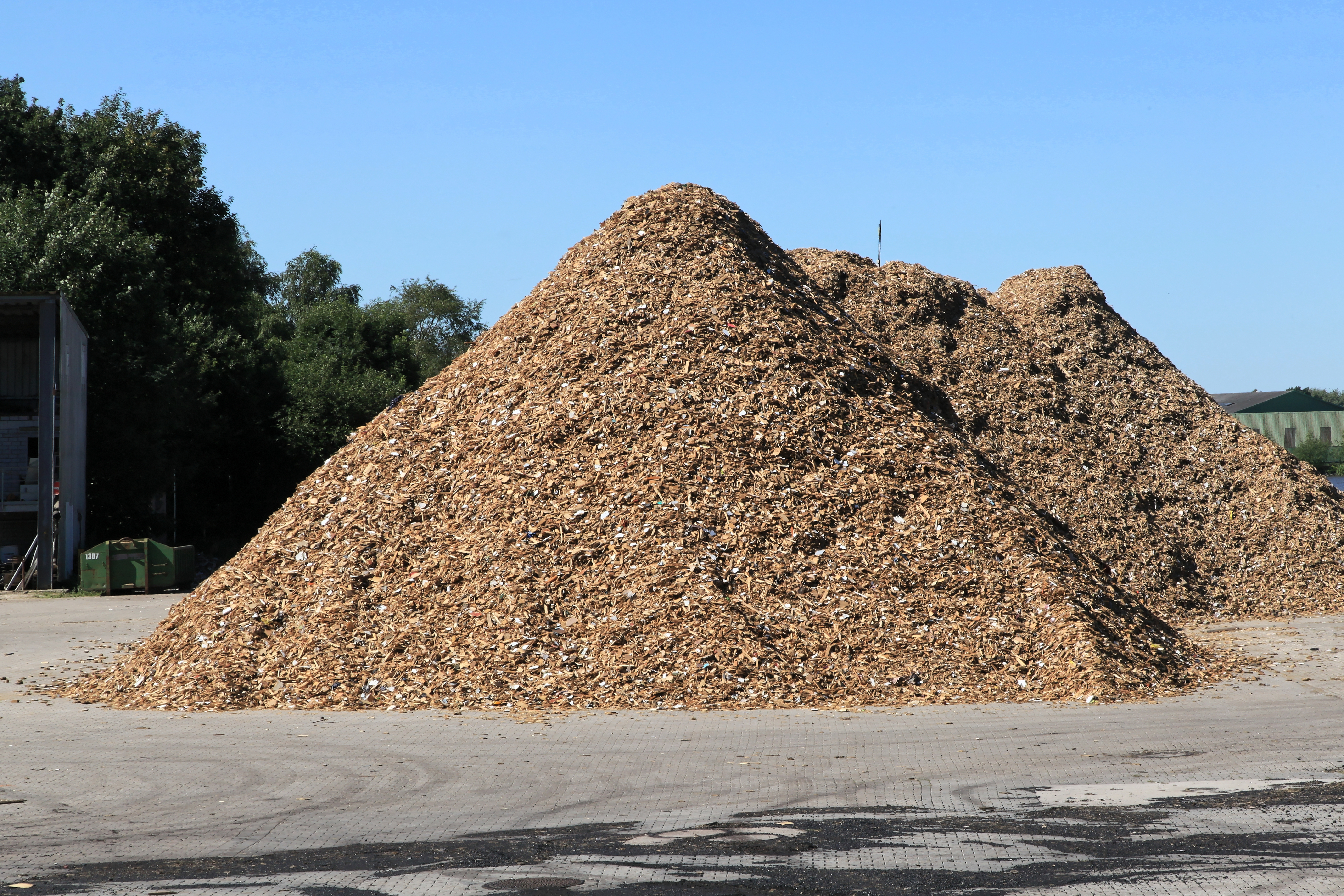 HRP Holzrecycling, Zur Seeschleuse in Papenburg